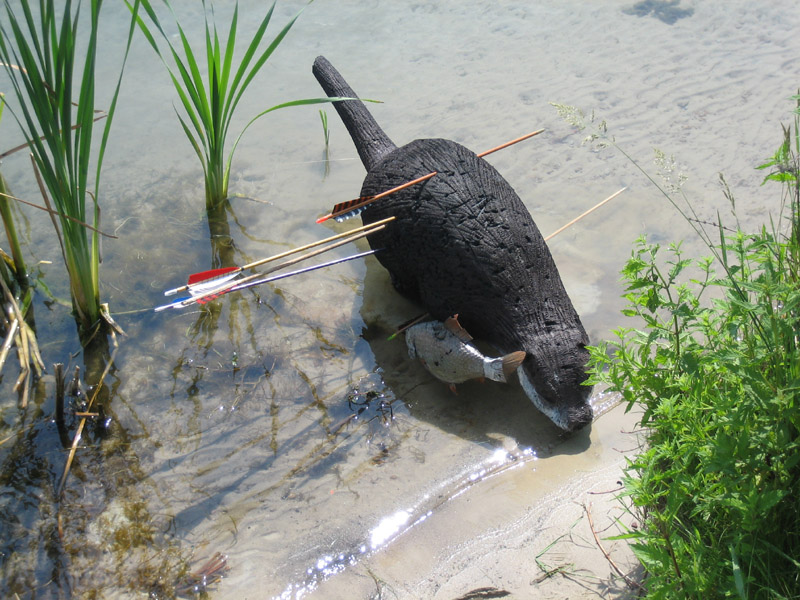 Photographer: D. Geritz